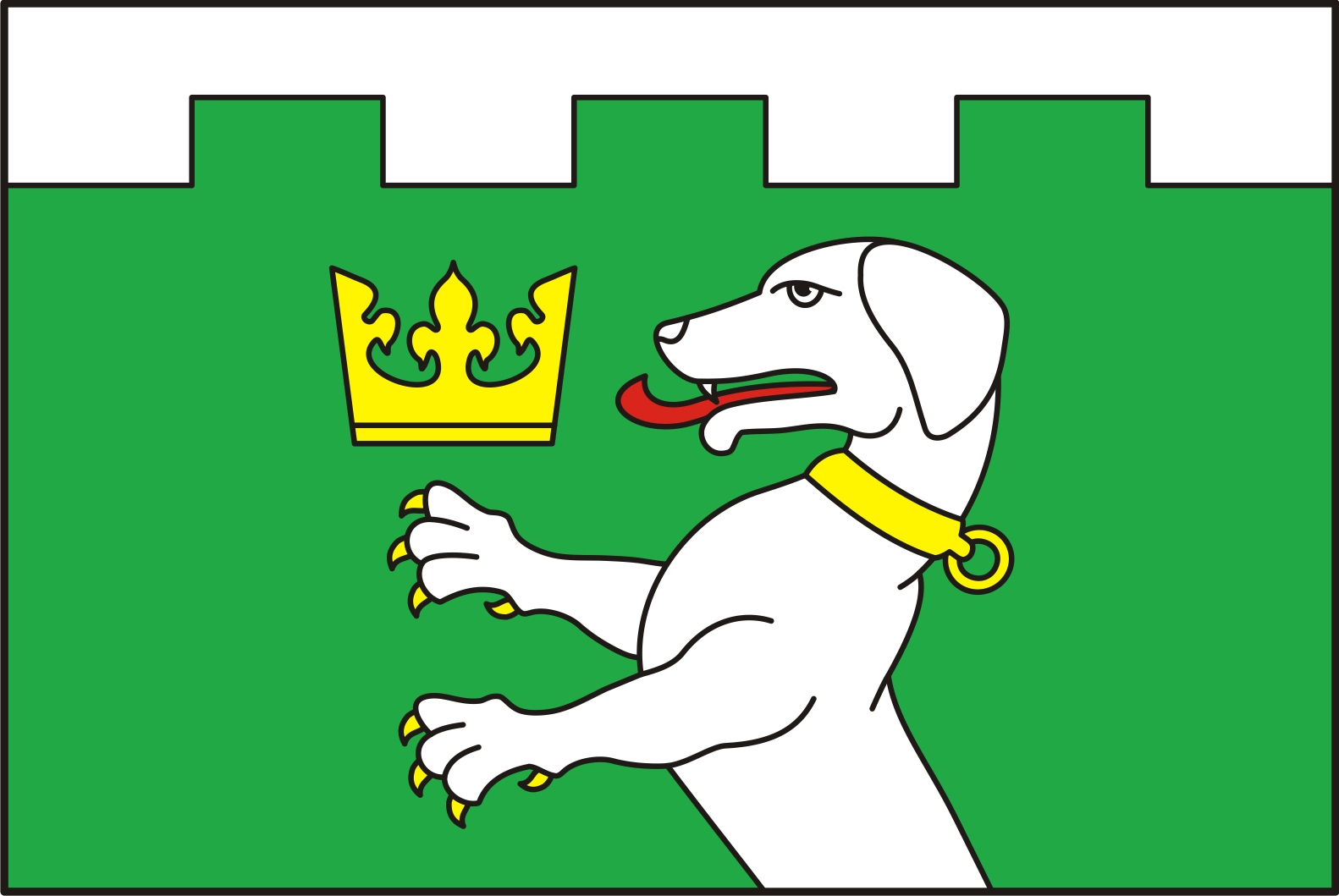 vlajka obce Tvrzice